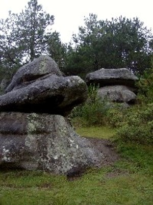 Valle de Piedras Encimadas